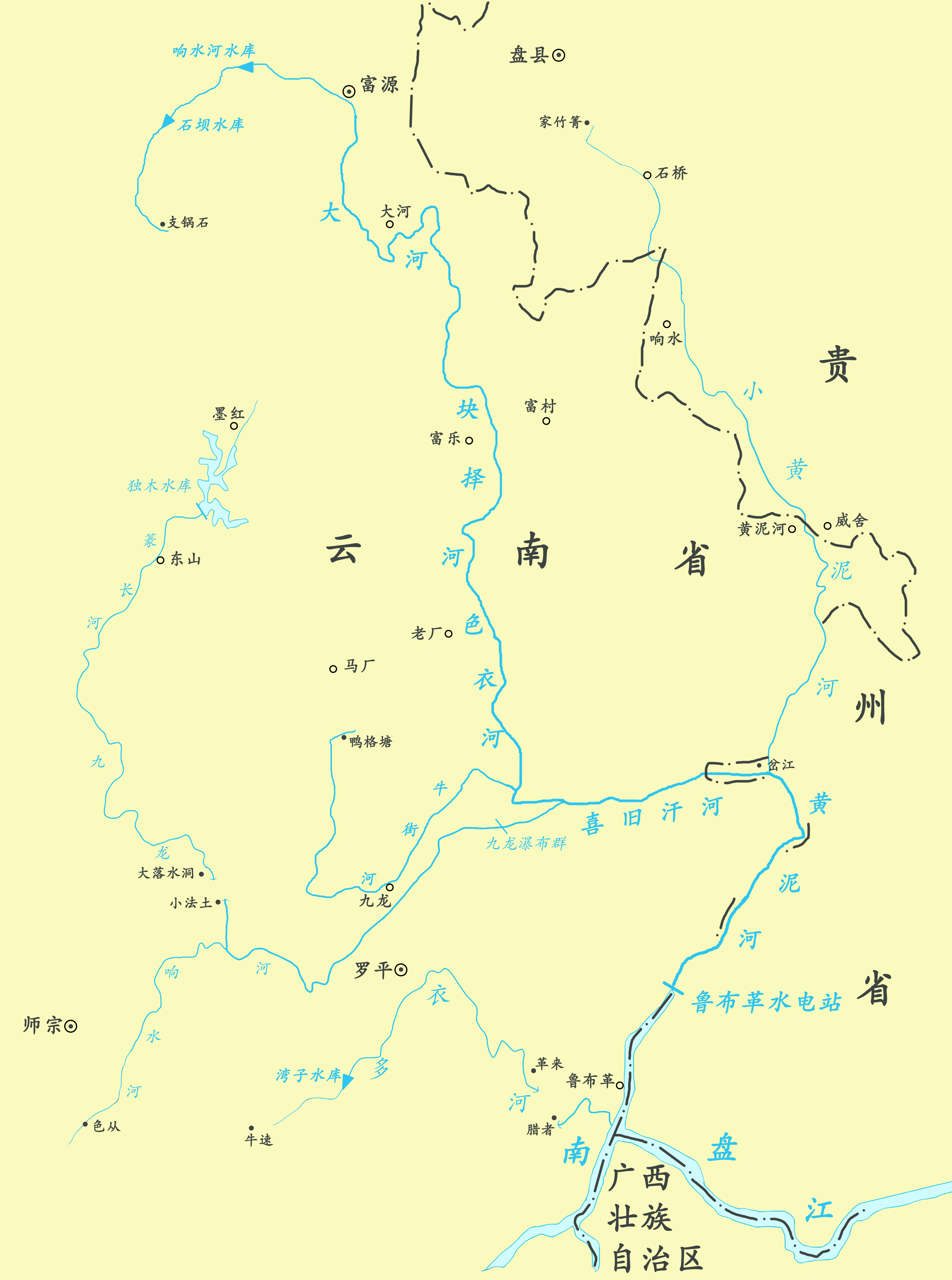 位于中国云南和贵州交界的黄泥河干流及其主要支流示意图，数据以《中国河湖大典·珠江卷》为准。